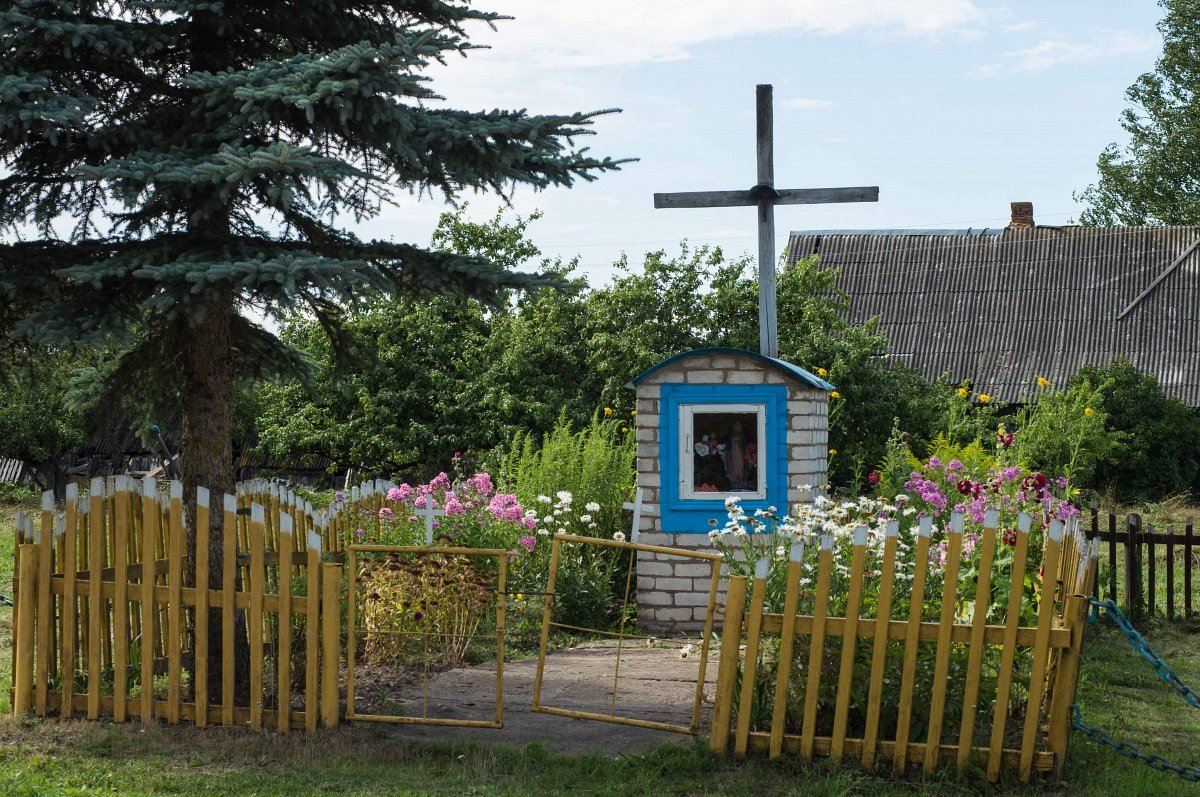 Зашчэсле (Ураджайная). Капліца